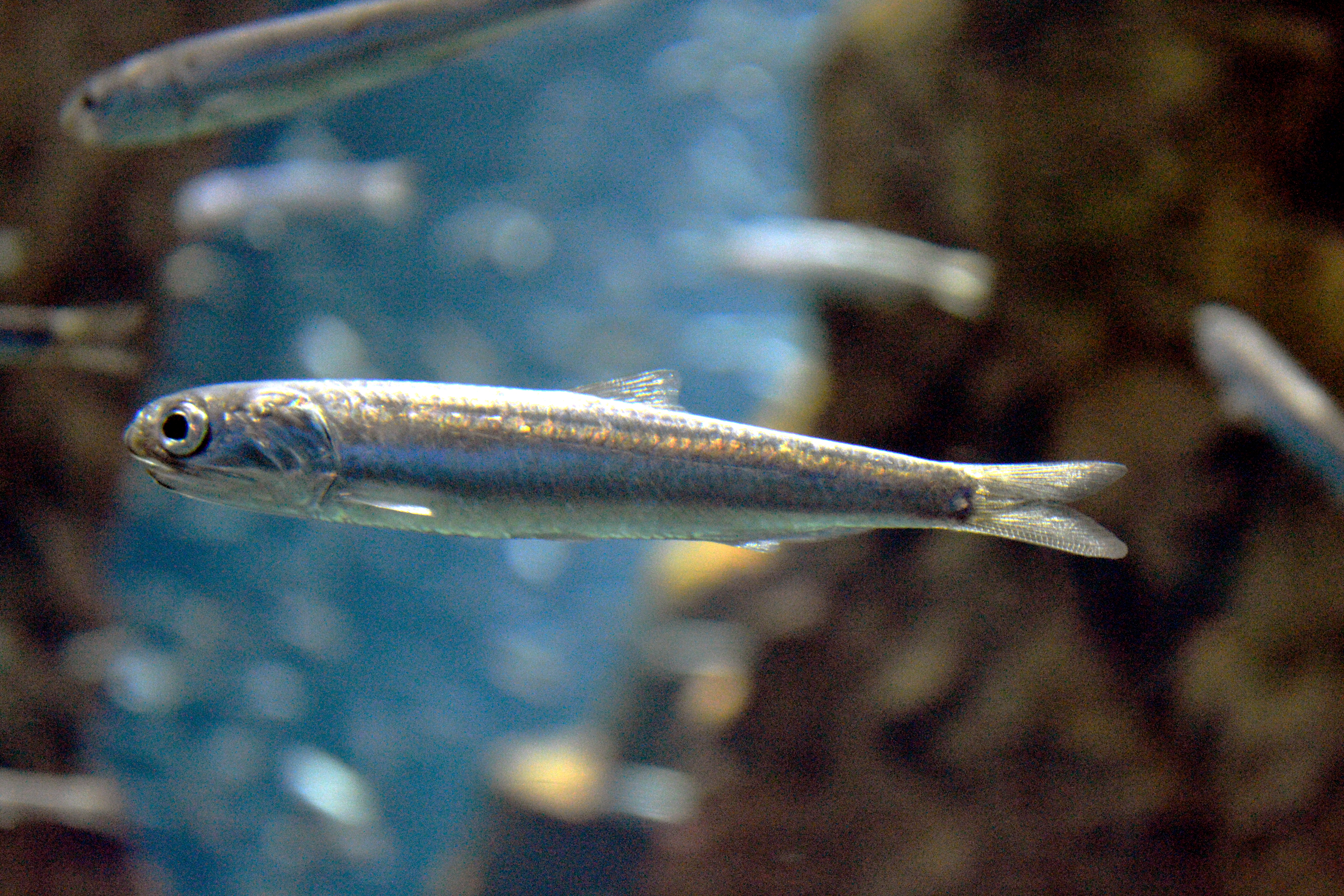 カタクチイワシの成魚。海遊館にて。